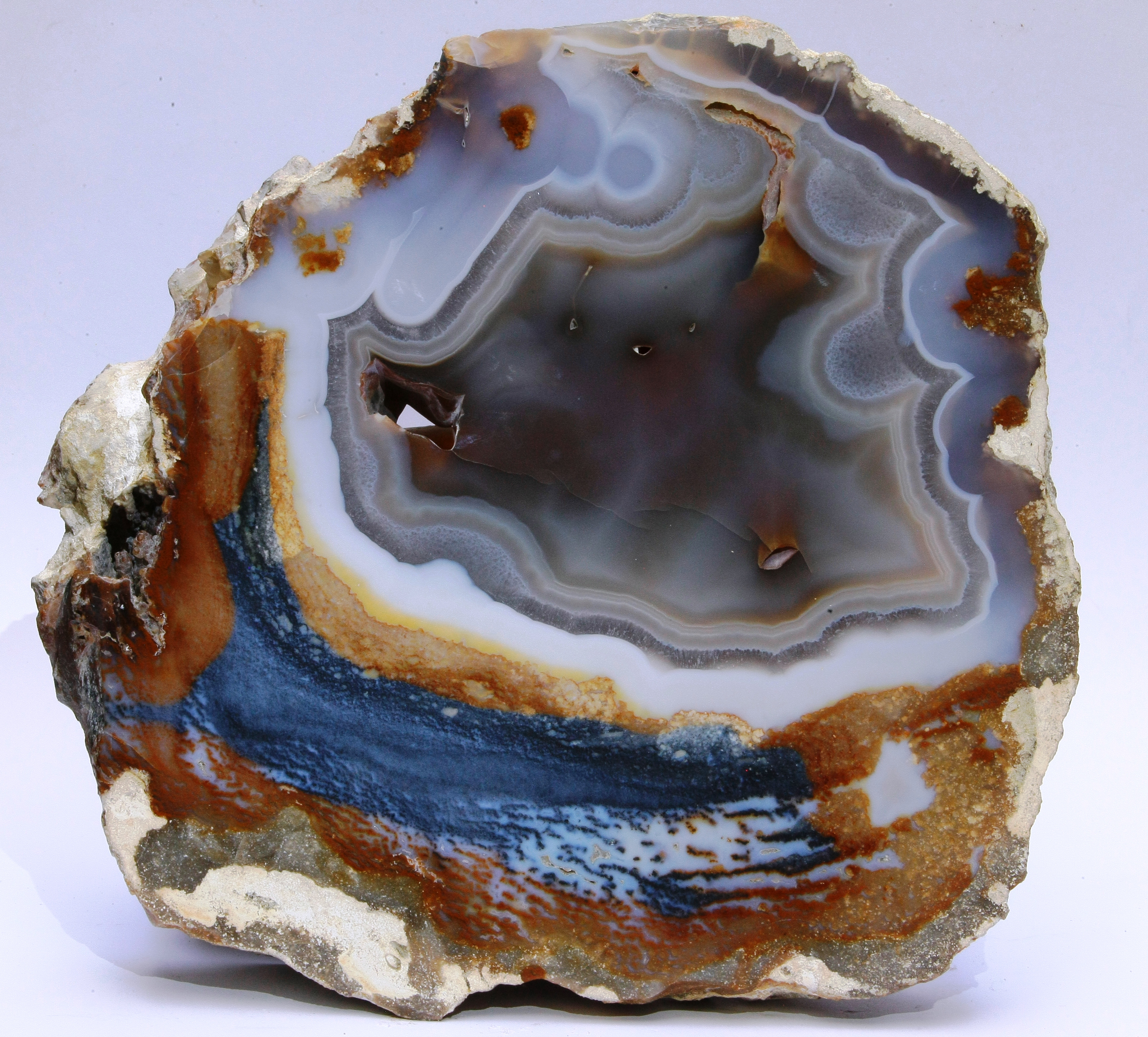 Ахат, Шумен